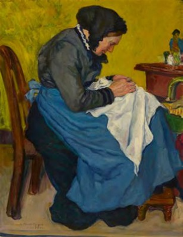 Ludwig Heinrich Heyne: Bildnis einer nähenden Frau.